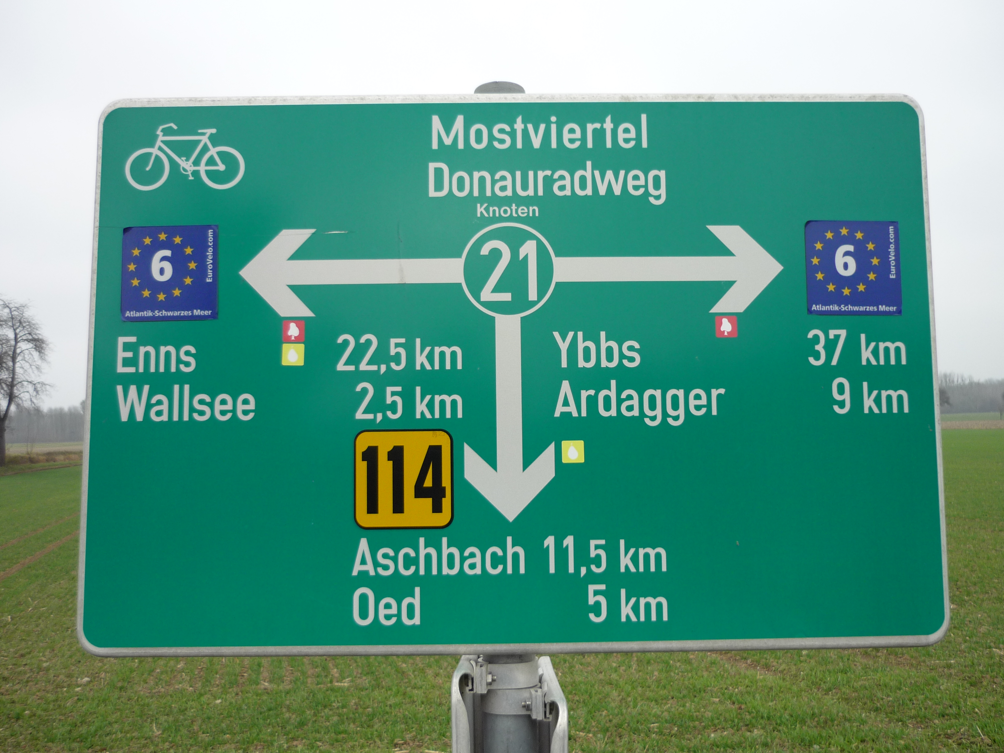 Wegweisung des Mostviertler Donauradwegs